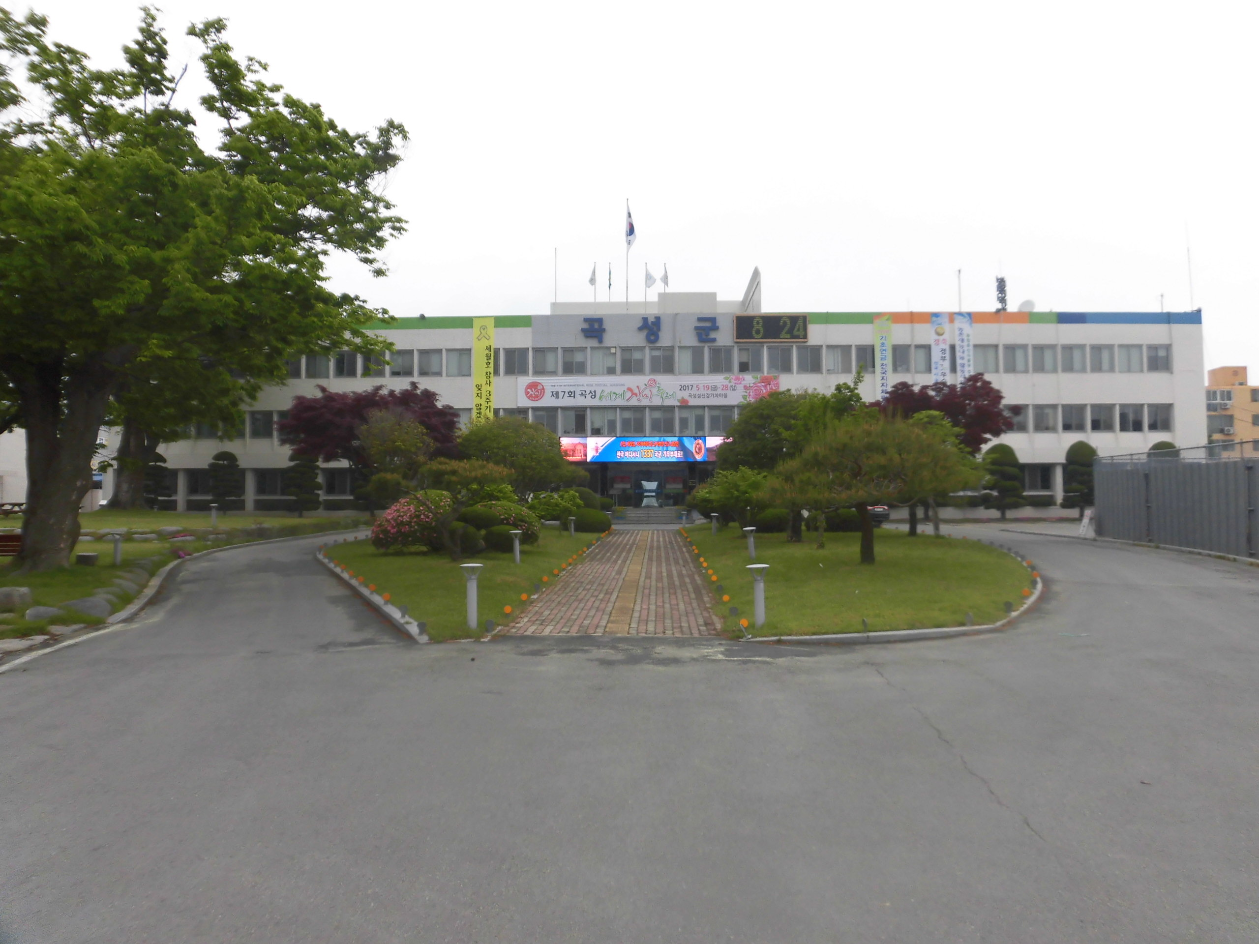 전라남도 곡성군에 있는 곡성군청